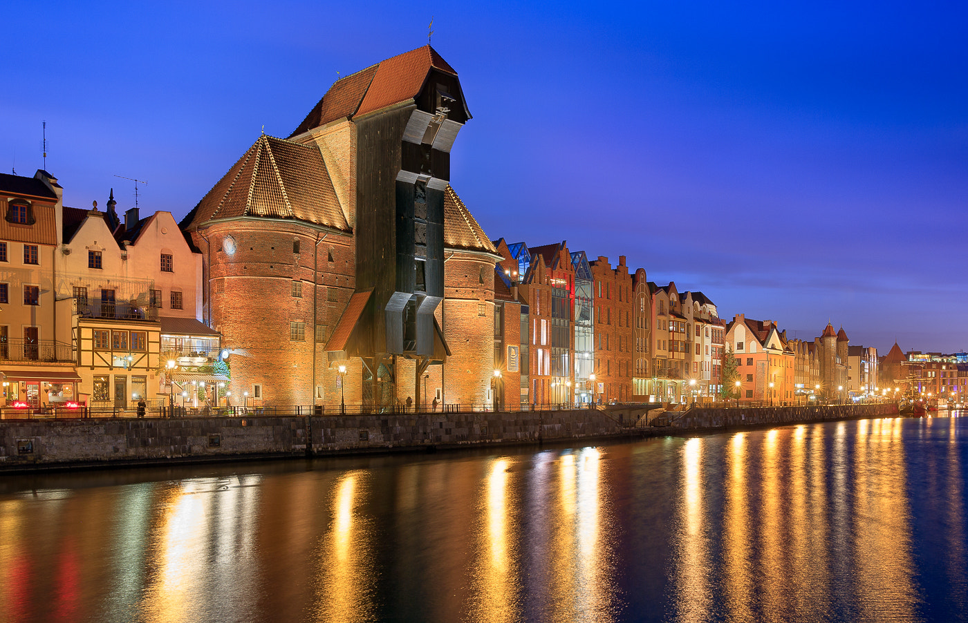 500px provided description: Brama ?uraw w Gda?sku Zdj?cie do wykorzystania komercyjnego i niekomercyjnego. Prosimy o oznaczenie HRS Poland jako autora zdj?cia. Na przyk?ad: ?r?d?o: ?r?d?o: HRS Poland - Gda??k Please tag HRS Poland as a source. For example: Source: HRS Poland - Gdansk [#city ,#poland ,#port ,#polska ,#gda?sk ,#brama ?uraw]